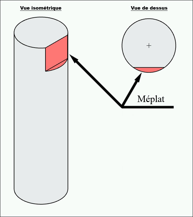 meplat